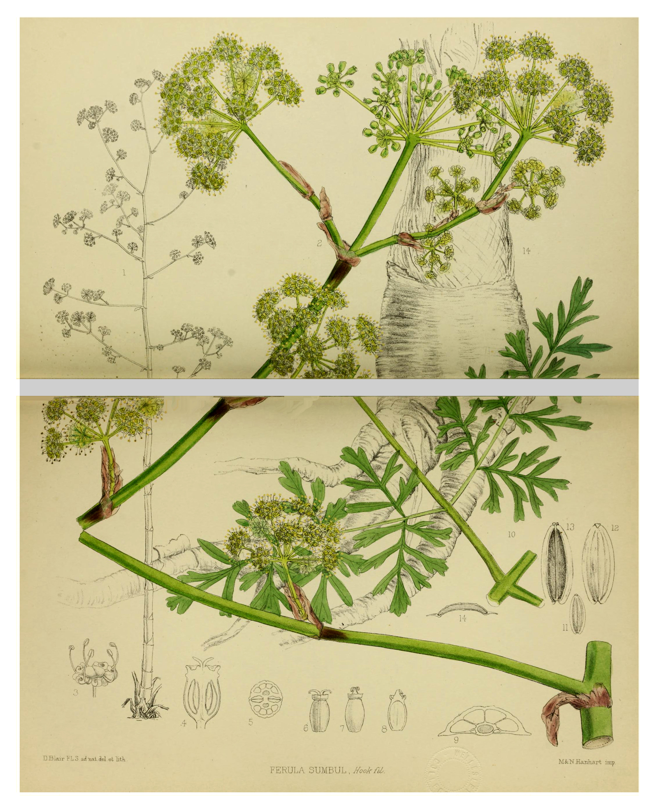 Abbildung von Ferula sumsul